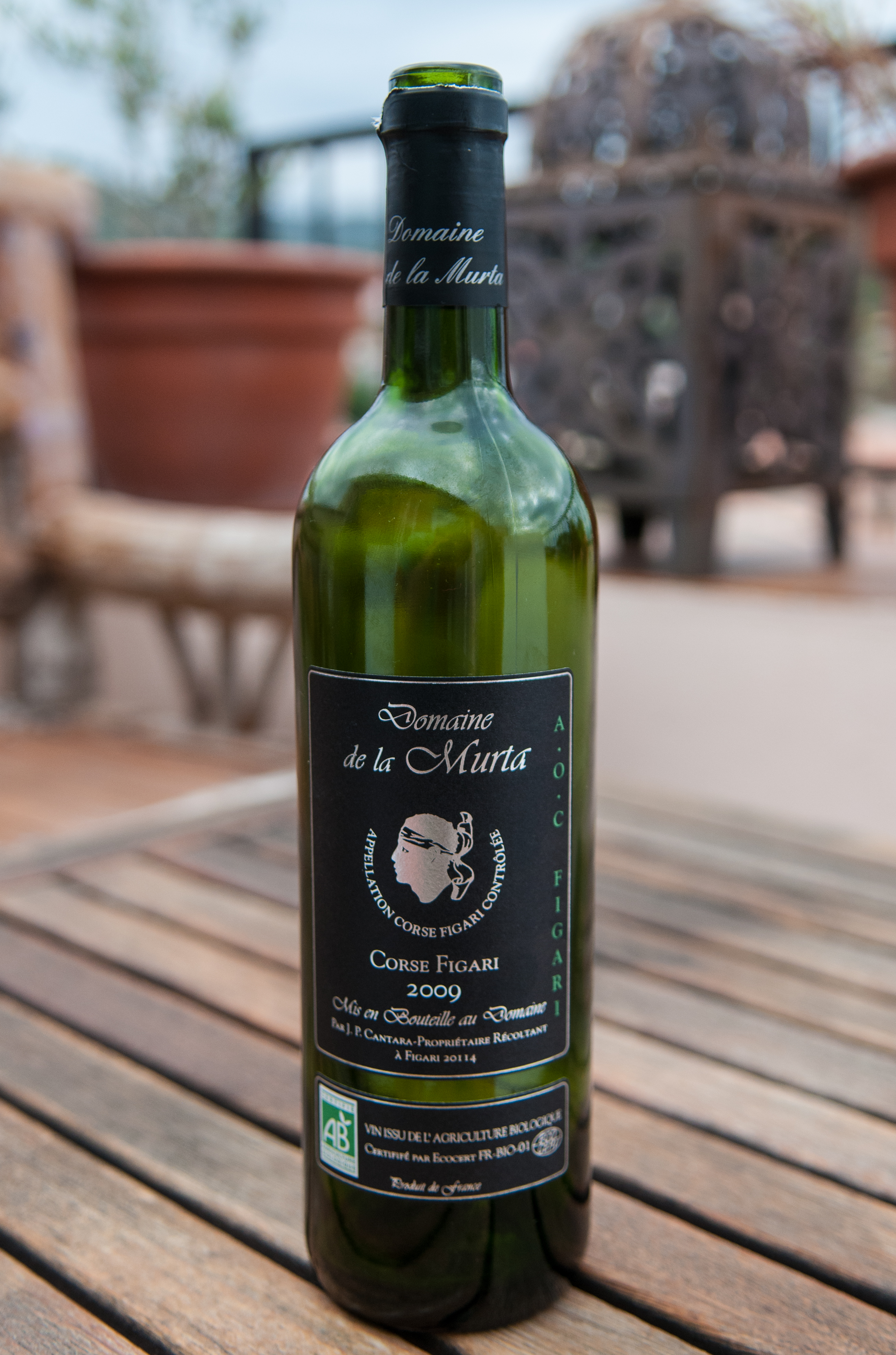 2009 Domaine de la Murta Corse Figari